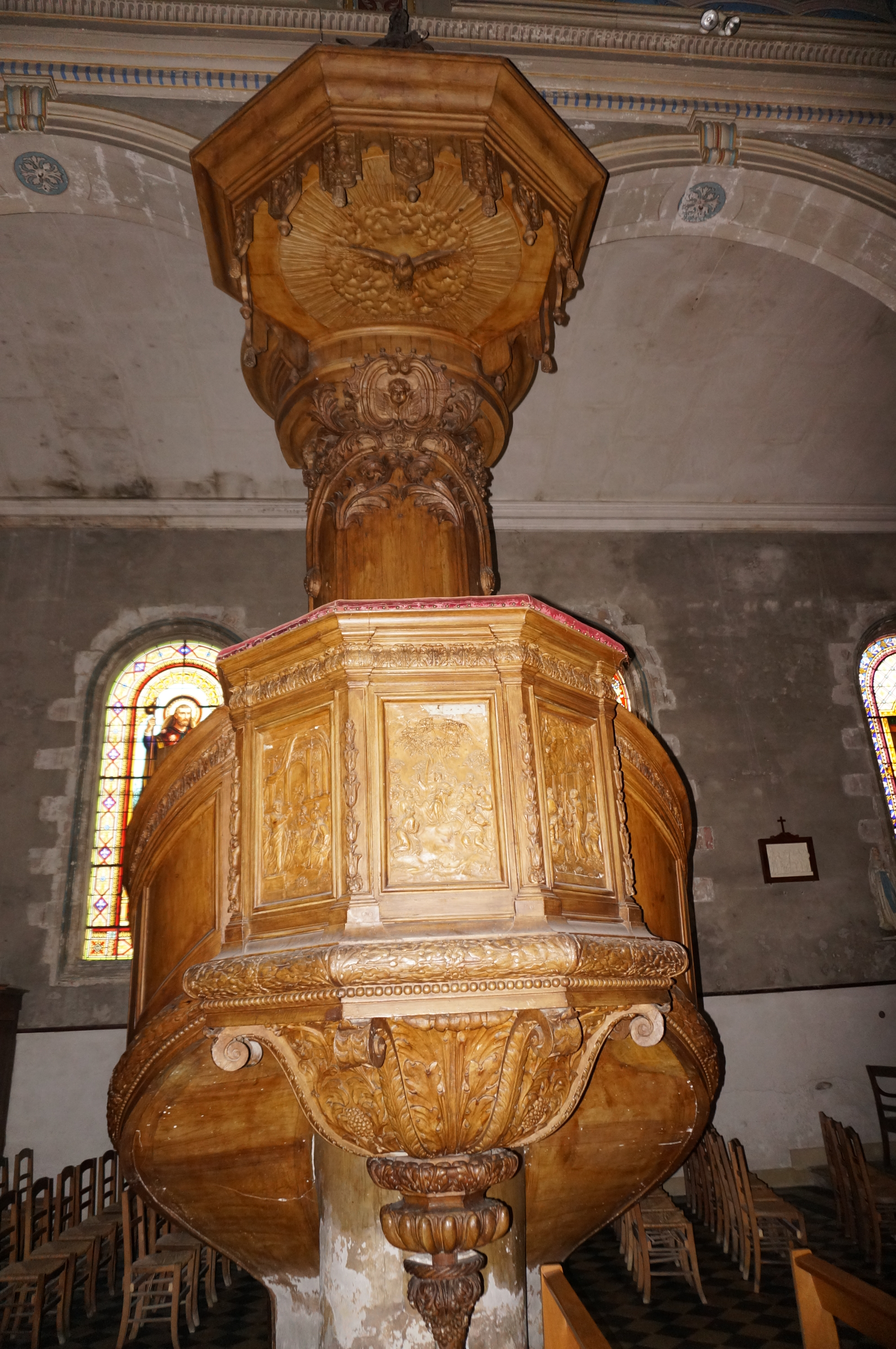 Église Saint-Vivien de Saintes.